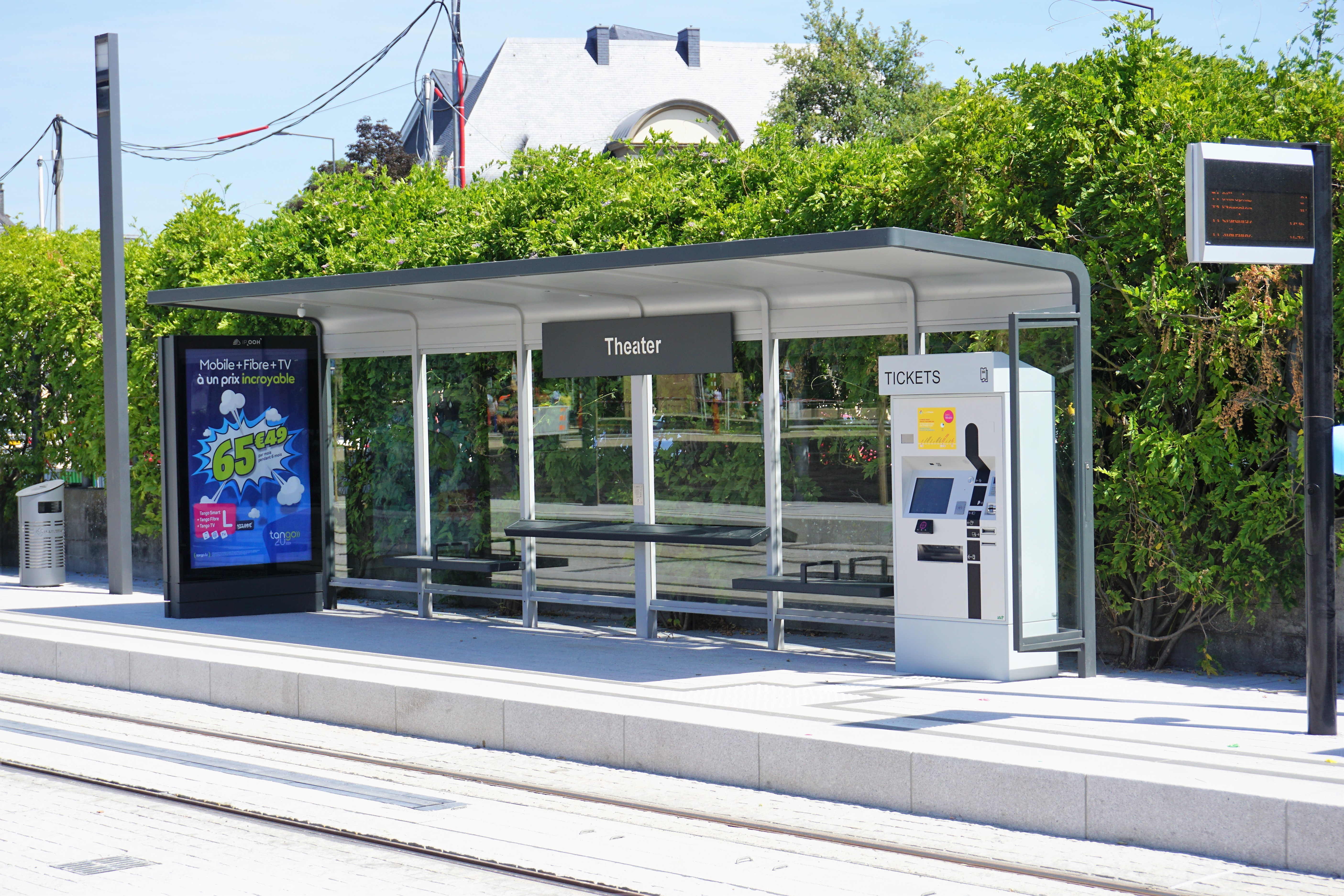 Luxembourg, station tram Theater.